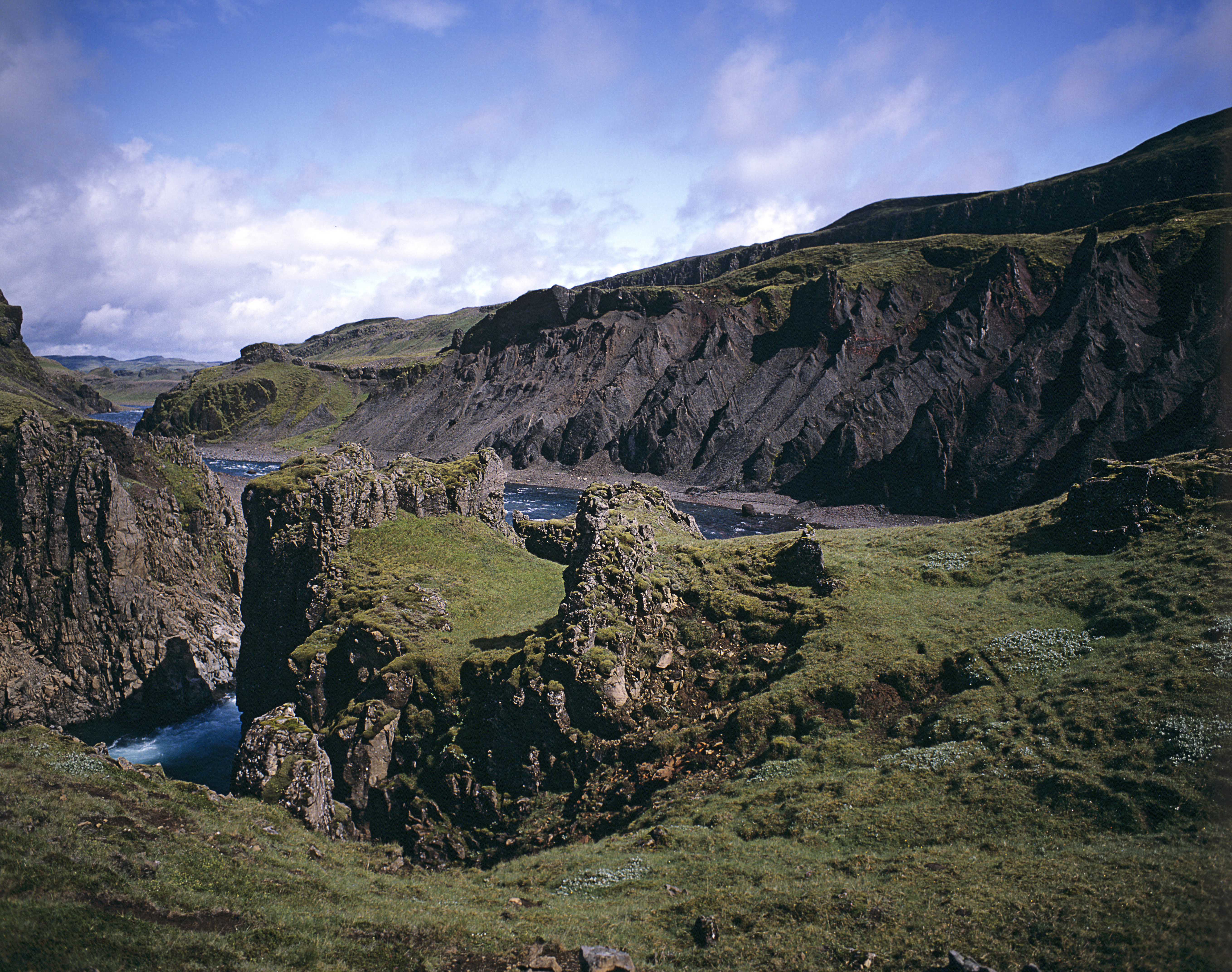 Stóra Laxá, ein Nebenfluss der Hvítá.